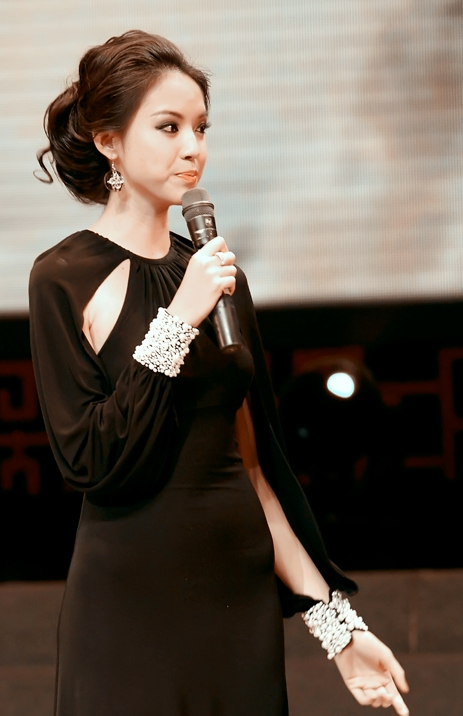 Zhang Zilin, Miss Monde 2007.